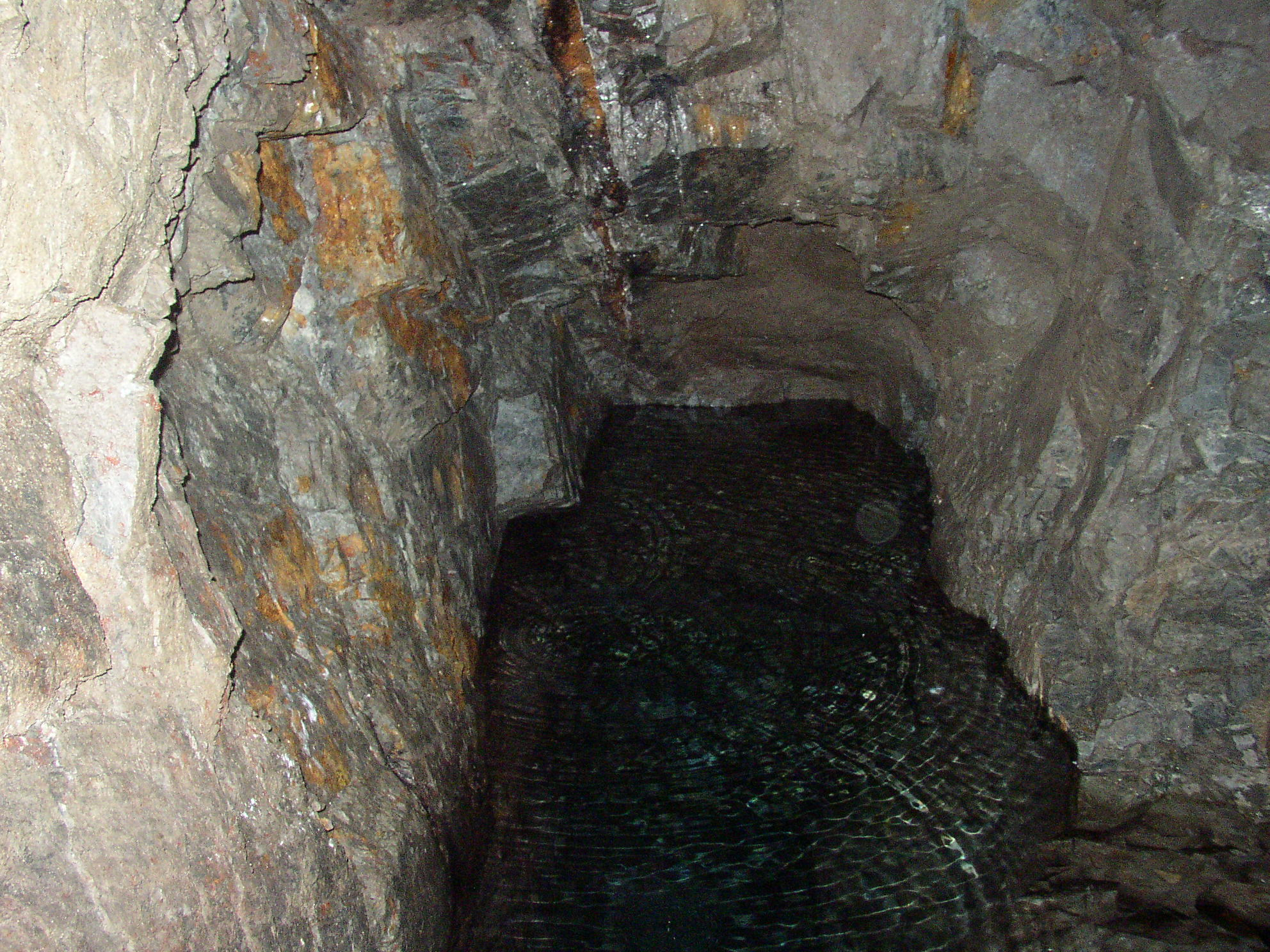 Jezírko ve vyrubaném hloubení v boční chodbě štoly sv. Jana Evangelisty